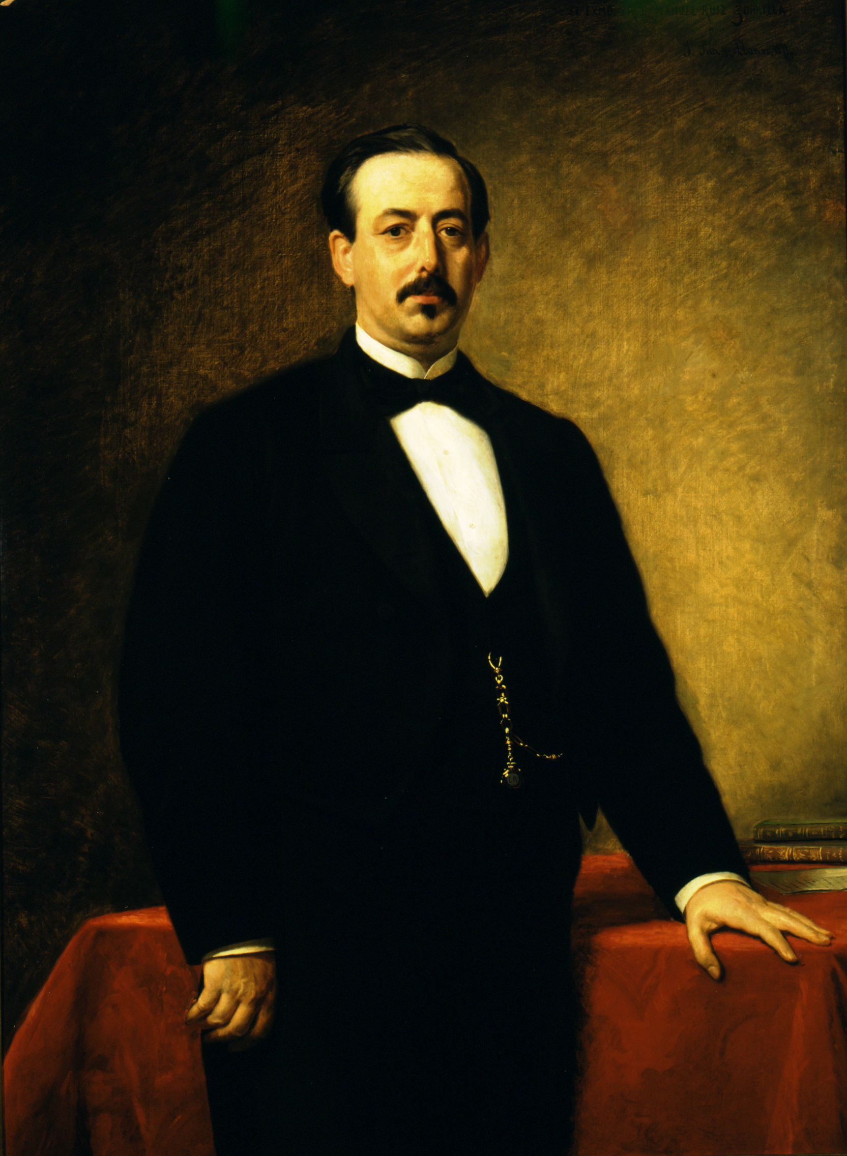 Retrato del político español Manuel Ruiz Zorrilla (1833-1895), que llegó a ser ministro de Fomento y también de Gracia y Justicia durante el Gobierno Provisional de 1868-1871.